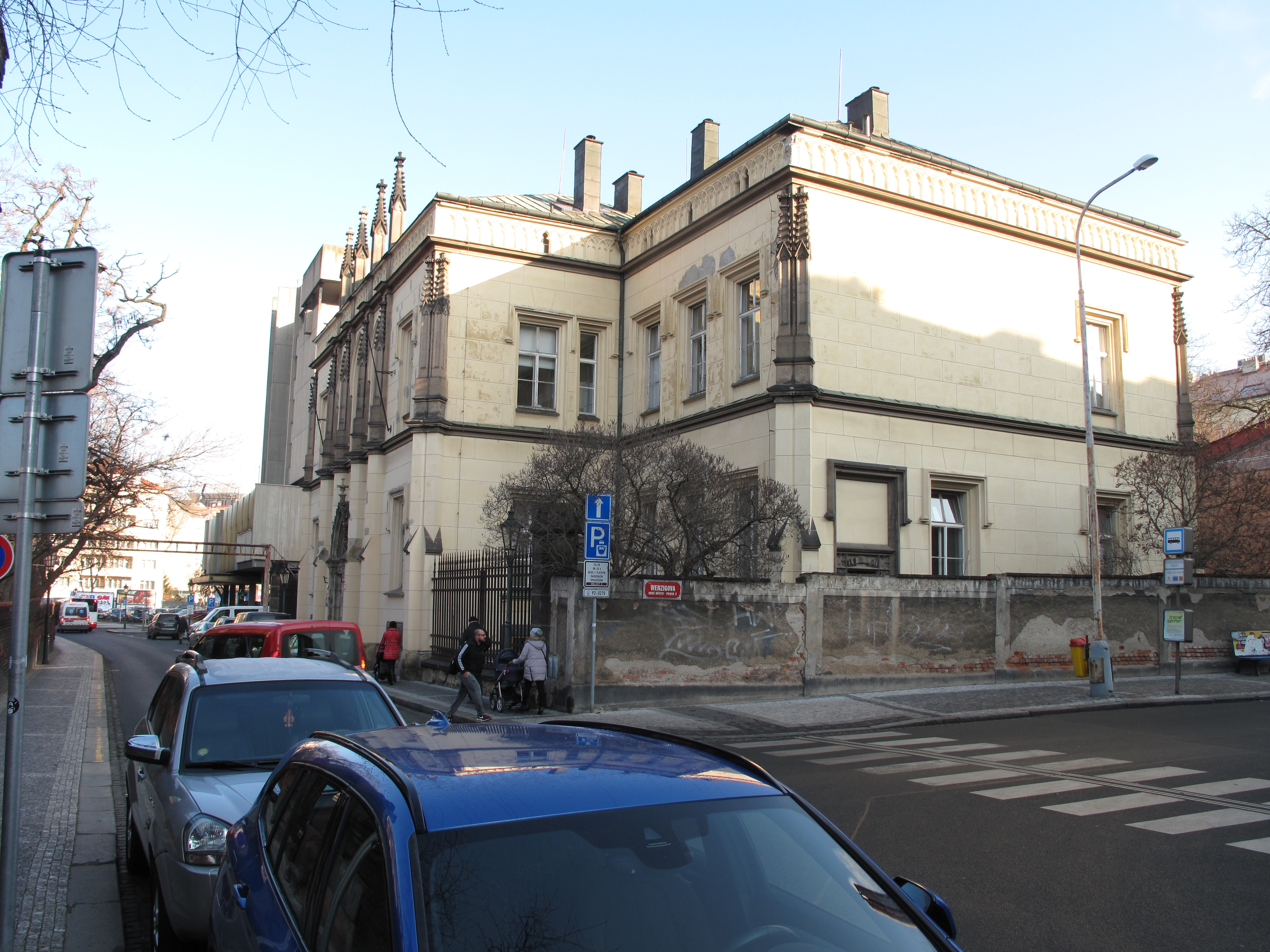 Kupecká nemocnice. Praha 2, Česká republika.